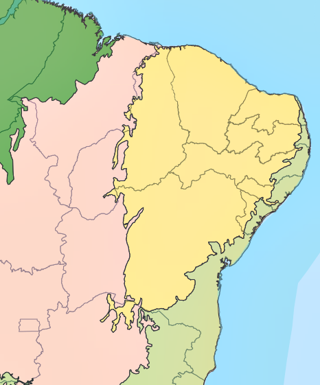 Biomas do Nordeste do Brasil. Amazônia Cerrado Caatinga Mata Atlântica Marinho Costeiro